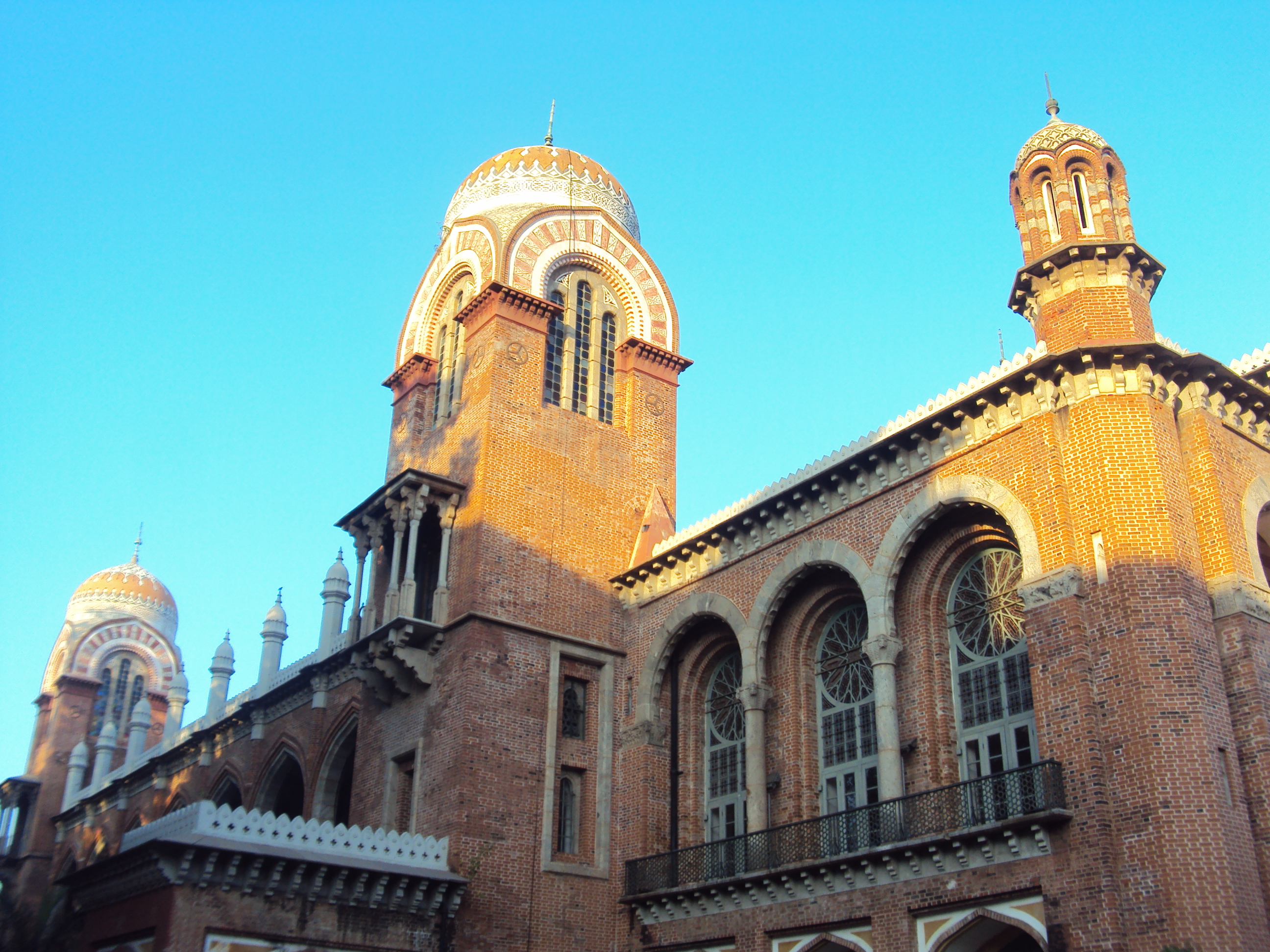 University of madras building